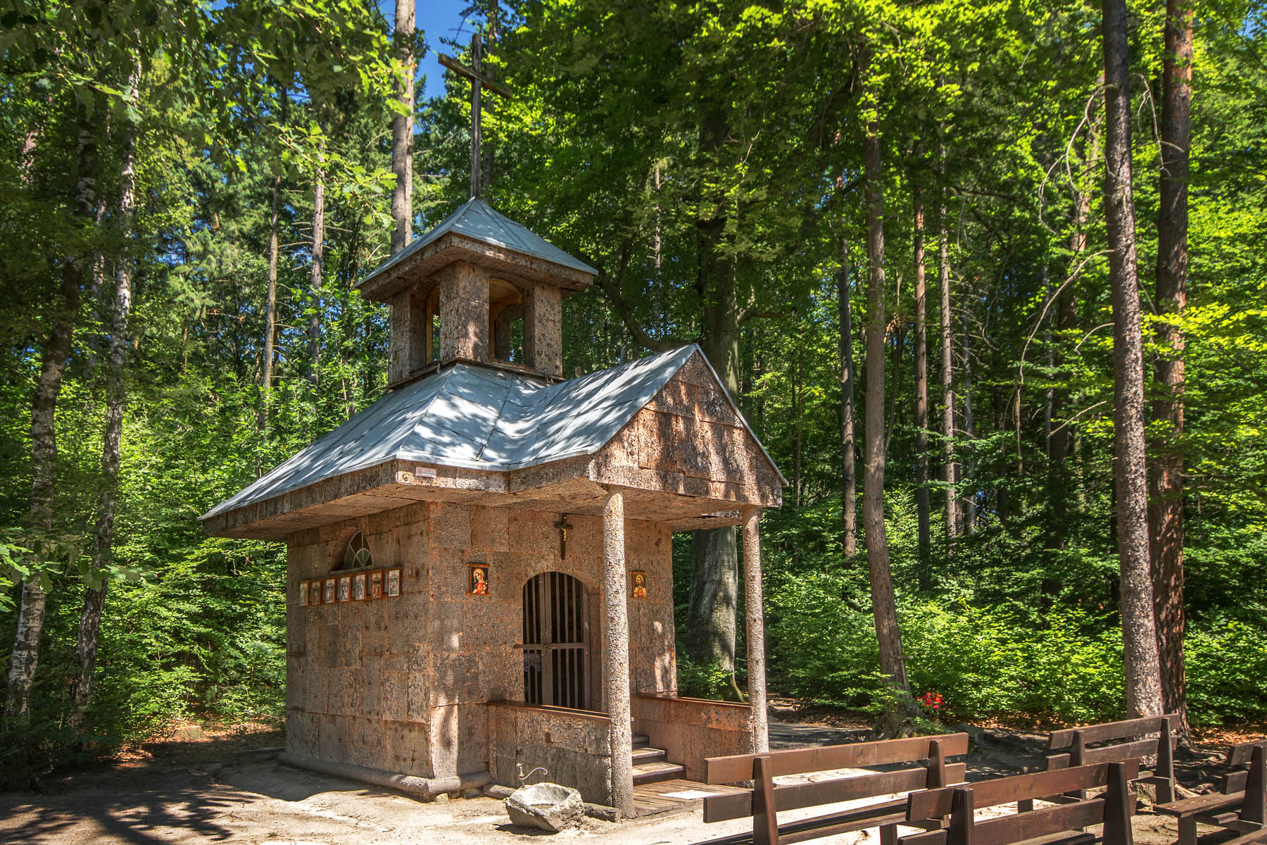 Lipno, kaplica leśna, XVIII